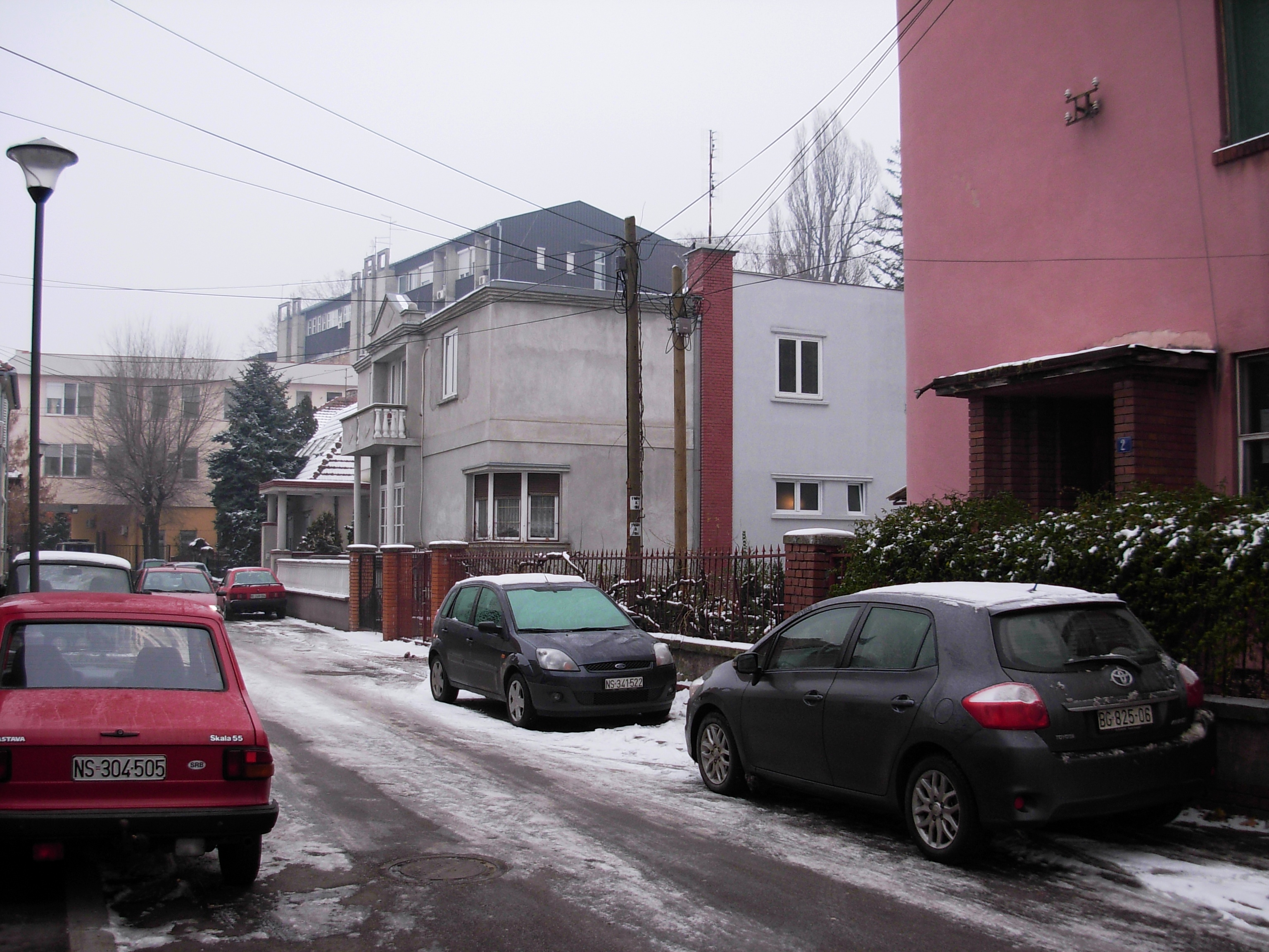 Ulica dr Hempta u Novom Sadu.